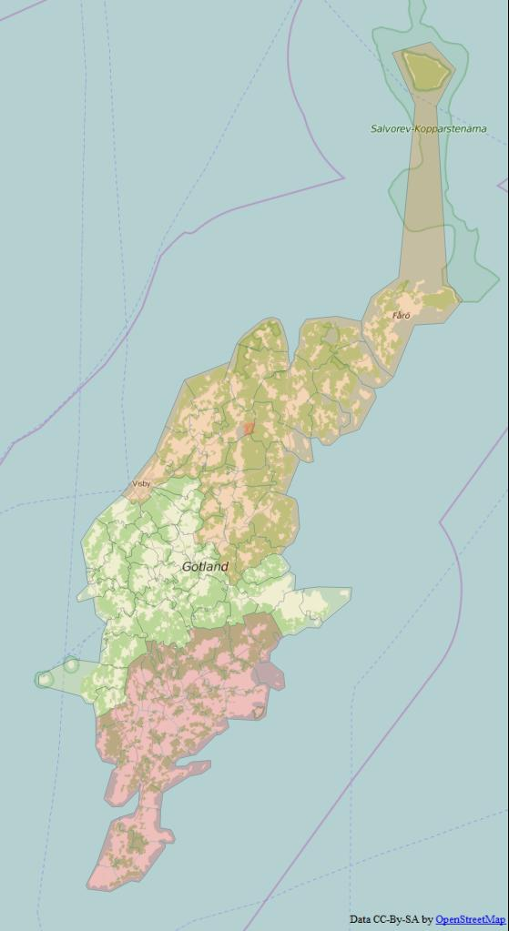 Gotlands tredingar World file: 338.25916603772208191 0 0 -338.25916603772208191 1984358.8410974913276732 8071230.95006457157433033